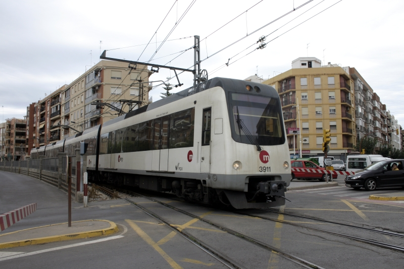 Unidad de Tren Eléctrica 3911 de FGV ([Ferrocarrils de la Generalitat Valenciana]) entrando a Palmaret [Alboraia]